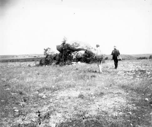 Fonds Trutat - Photographie ancienne Cote : TRU C 844 Localisation : Fonds ancien (S 30) Original non communicable Titre : Dolmen de Saint-Paul, Cahuzac, octobre 1896 Auteur : Trutat, Eugène Rôle de l’auteur : Photographe Lieu de création : Cahuzac-sur-Vère (Tarn) Date de création : 1896 Mesures : : 8 x 9 cm Mot(s)-clé(s) : -- Dolmen -- Pierre -- Champ -- Prairie -- Arbre -- Colline -- Automne -- Homme -- Sac -- Cahuzac-sur-Vère (Tarn) -- Castelnau-de-Montmiral (Tarn ; canton) -- Midi-Pyrénées (France) -- Dolmen de Saint-Paul (Cahuzac) -- 19e siècle, 4e quart Médium : Photographies -- Négatifs sur plaque de verre -- Noir et blanc -- Paysages Bibliothèque de Toulouse. Domaine public